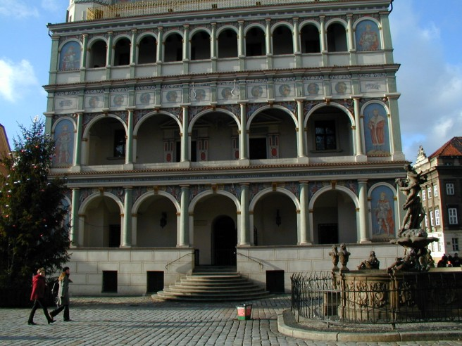 Loggia ratusza na Starym Rynku w Poznaniu